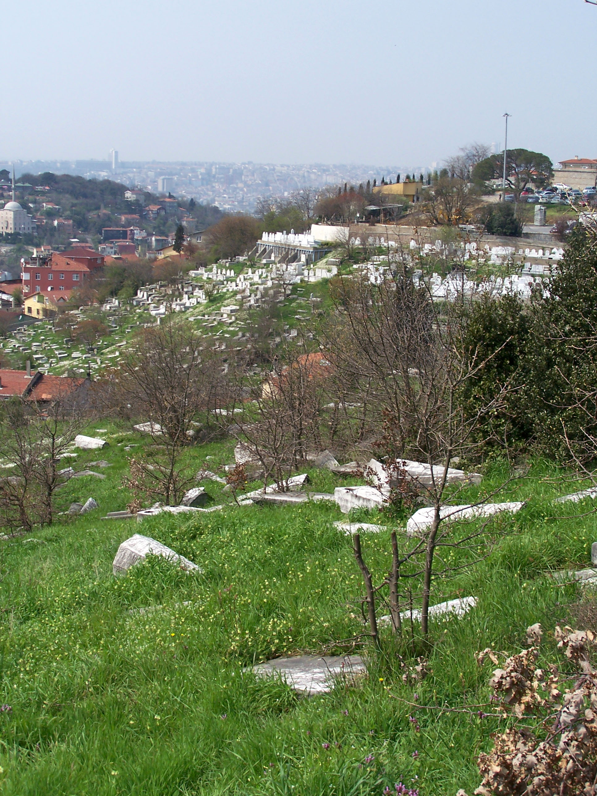 Musevi Mezarlığı (Jewish cemetery) in İcadiye-Üsküdar